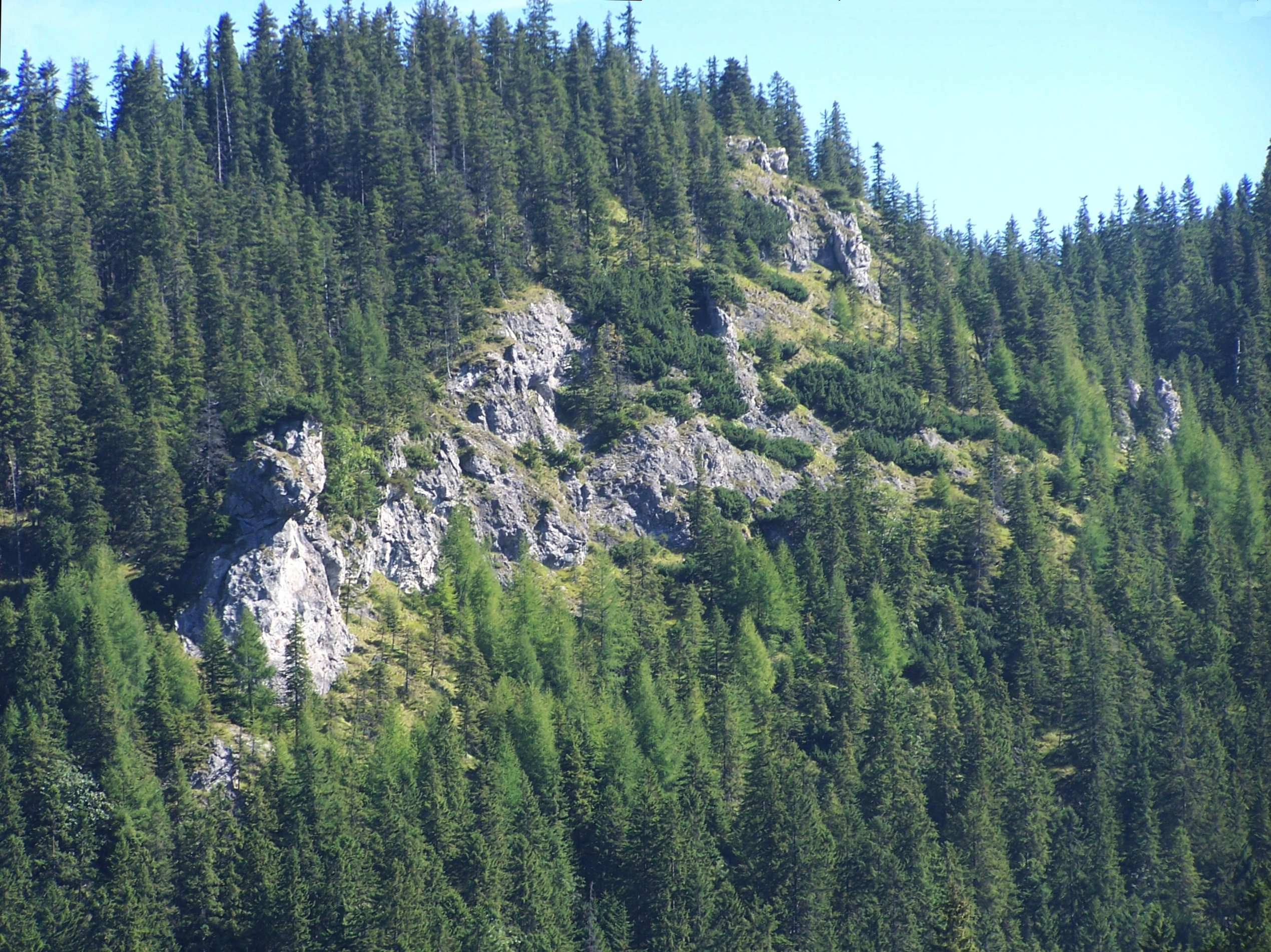 Kobyle Głowy nad Doliną Huciańską